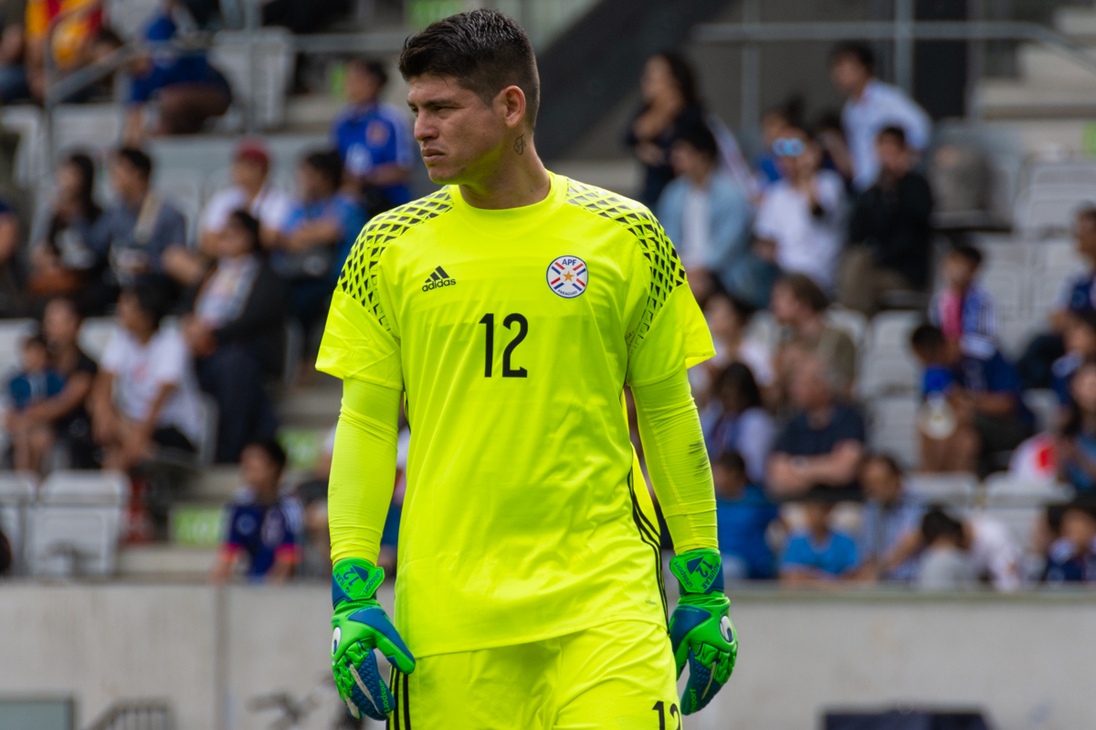 Alfredo Aguilar